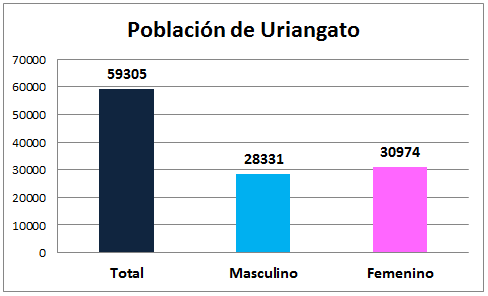 Población de Uriangato por género